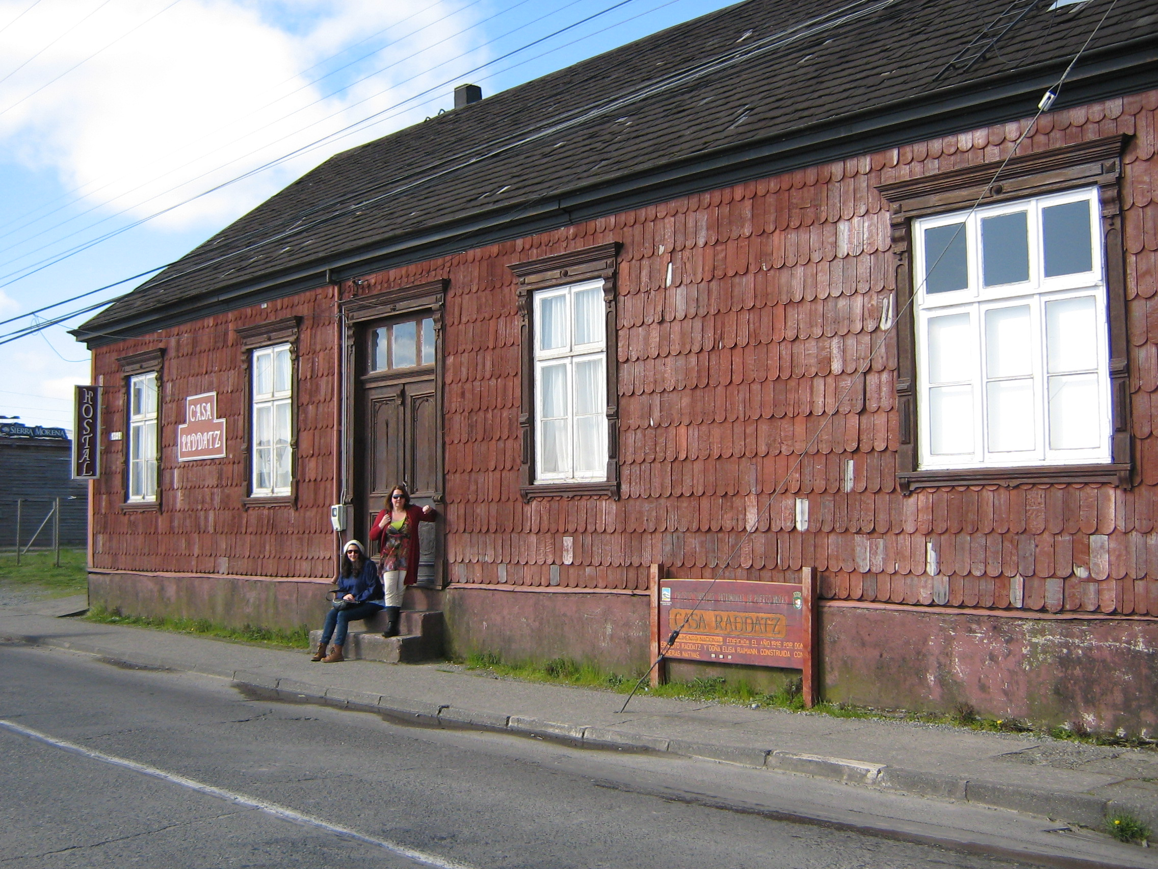 Casa Raddatz This is a photo of a national monument in Chile: 730